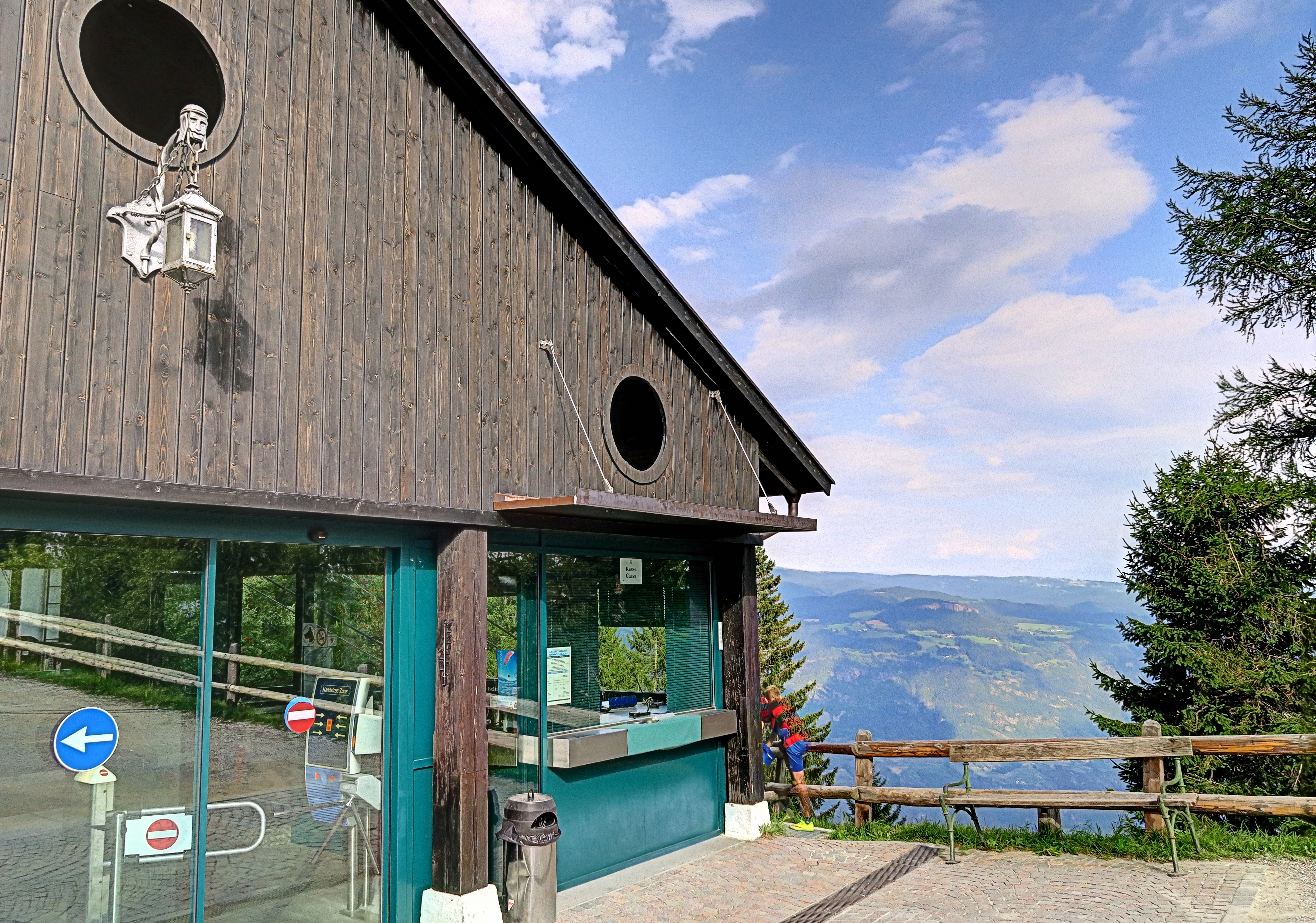 Bergstation der Seilbahn von Lana auf das Vigiljoch in den Ortler-Alpen